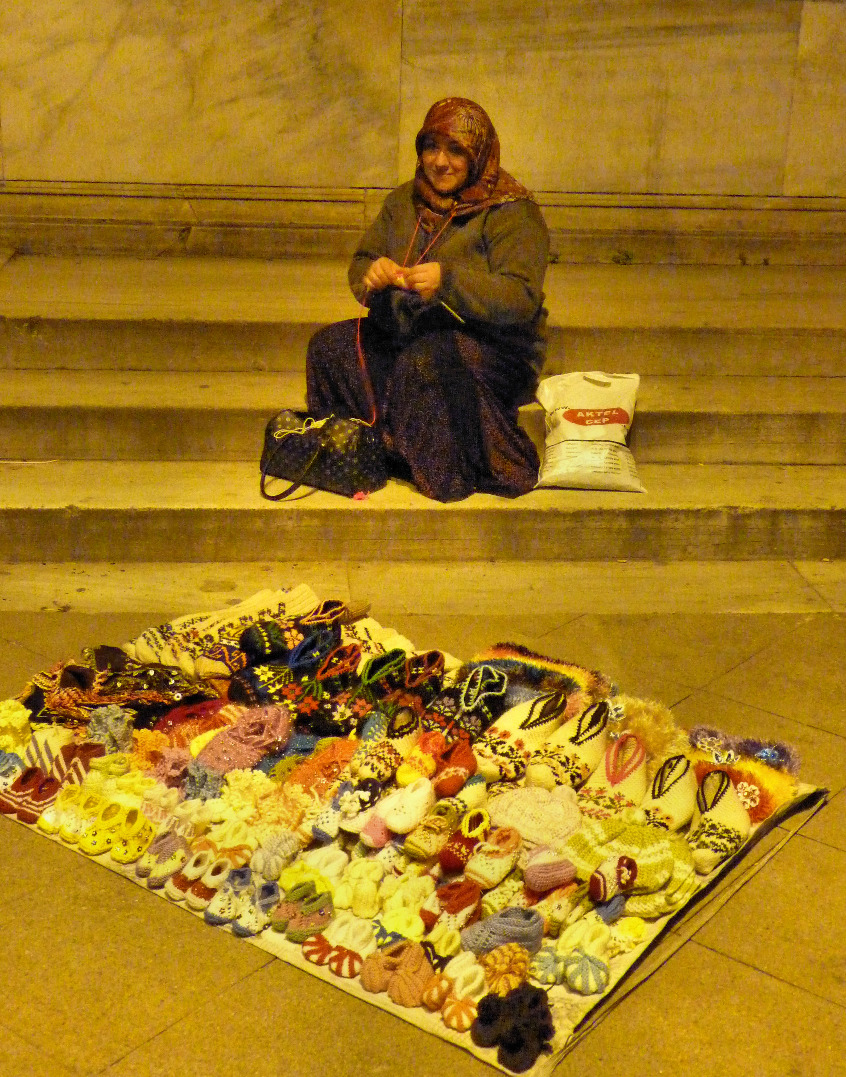 Istanbul - Venditrice